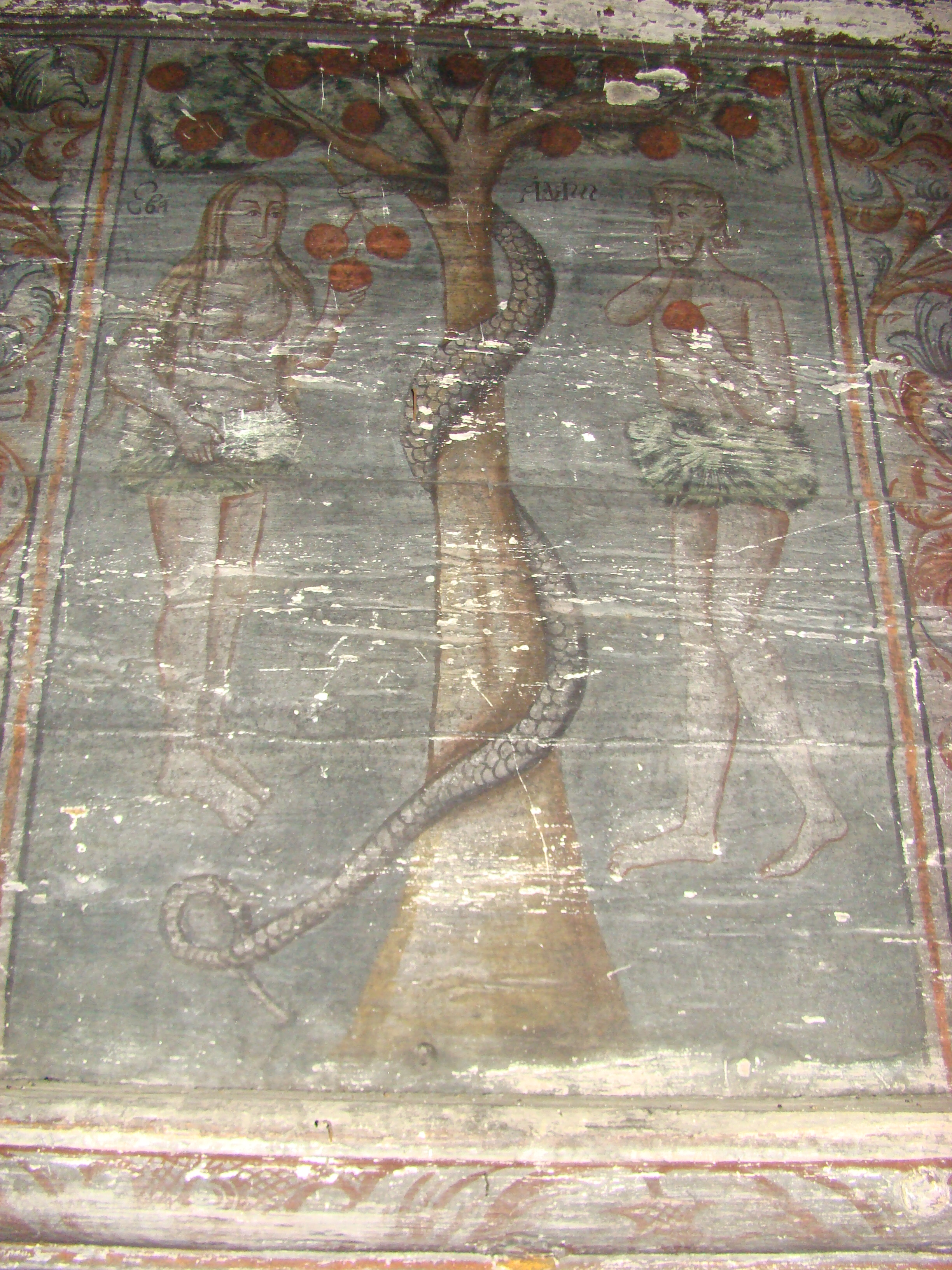 Biserica de lemn din Osoi